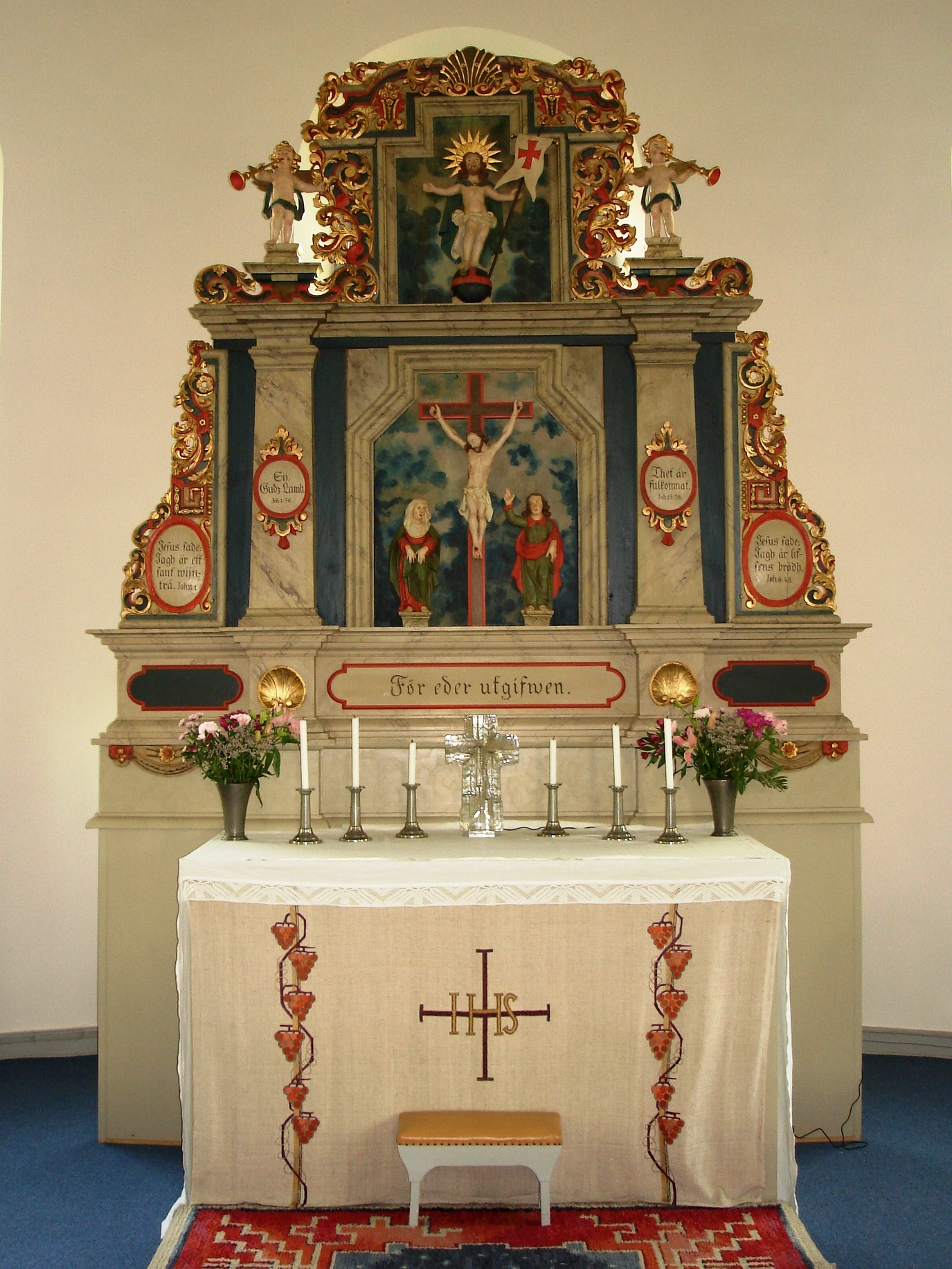 Altartavla